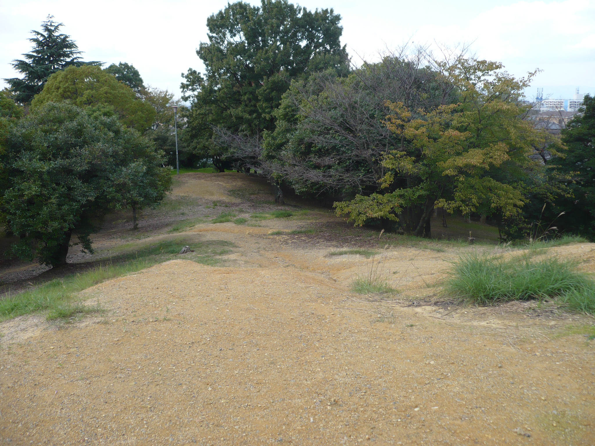 貝吹山古墳